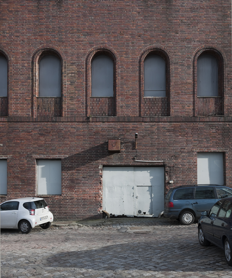 Potsdam, Albert-Einstein-Str. 1-7/Heinrich-Mann-Allee 1-3, ehem. Brauerei Gebr. Hoffmann am Brauhausberg. Fenster und Tor am Sudhaus.